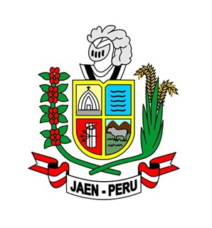 Escudo Provincia de Jaén, Perú